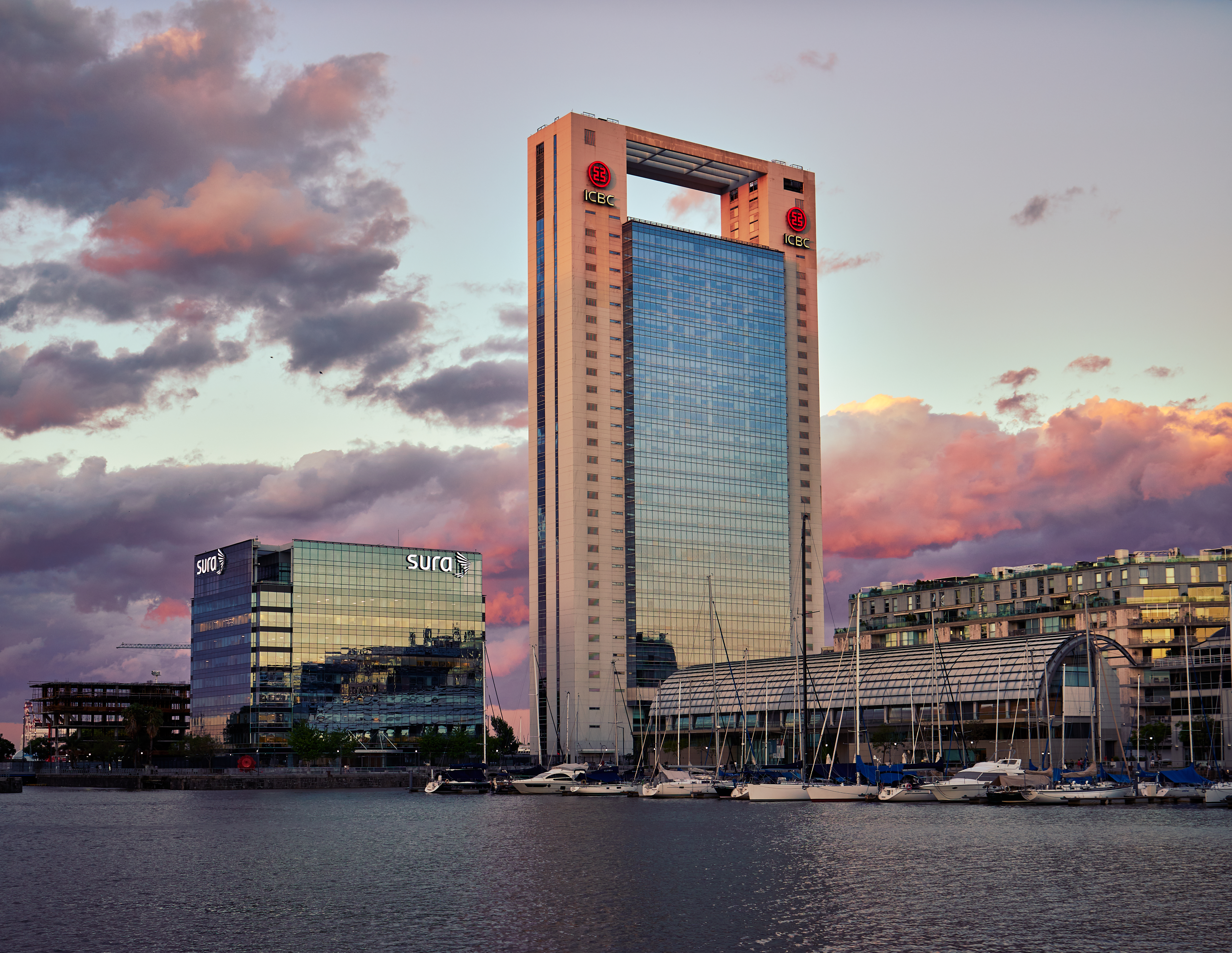 Puerto Madero, Buenos Aires